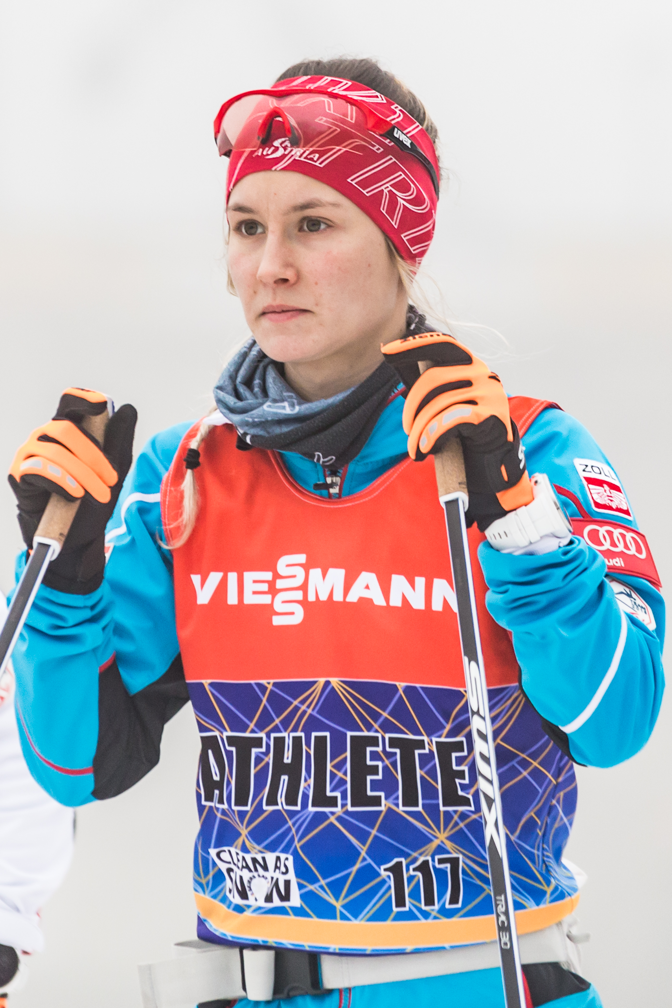 Lisa Unterweger (AUT, Österreich)